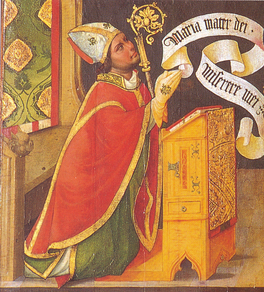 Berthold,_Burggraf_von_Nürnberg,_Bischof_von_Eichstätt_Mittealterliches_Tafelbild